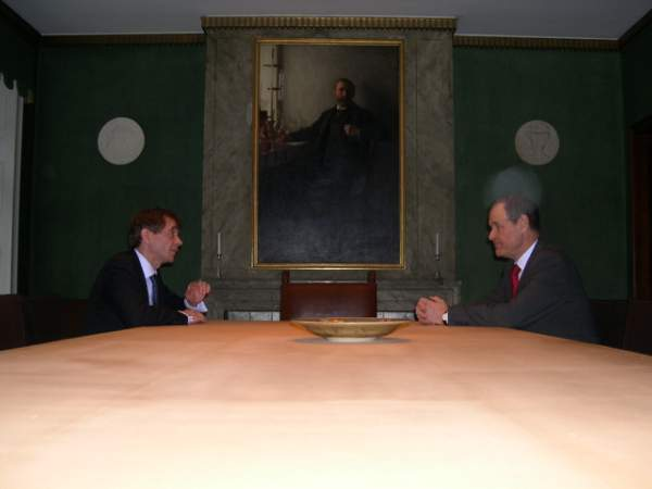 Лобанков В.С. и Профессор Микаэль Сульман, Исполнительный директор Нобелевского Фонда (с 1 мая 1992 по 15 июня 2011)